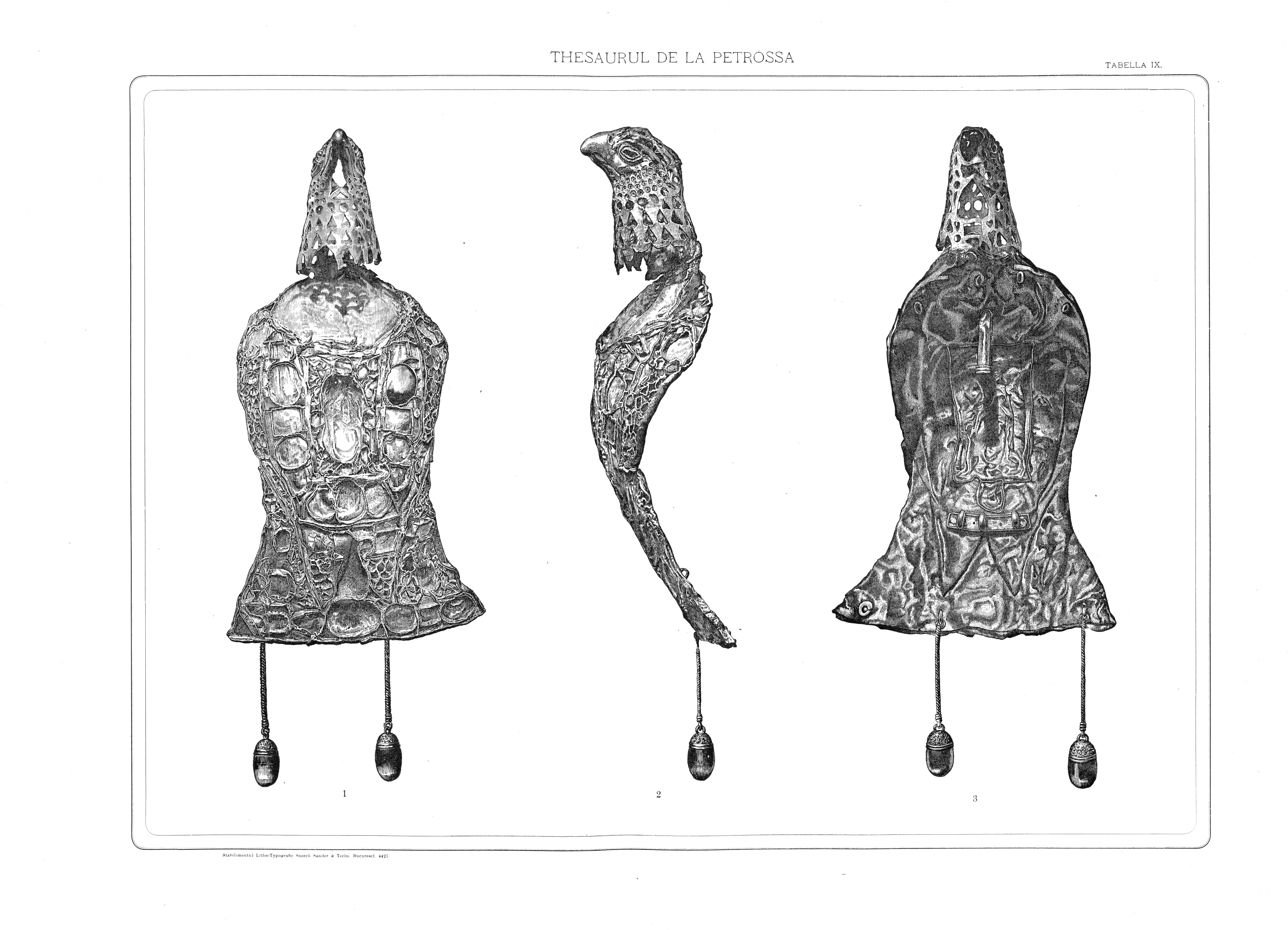 Paftaua cea mare sau fibula, în formă de șoim. De la această pafta și de la cele următoare mai mică, și-a luat numele Tezaurul de la Pietroasa de Cloșca cu pui.